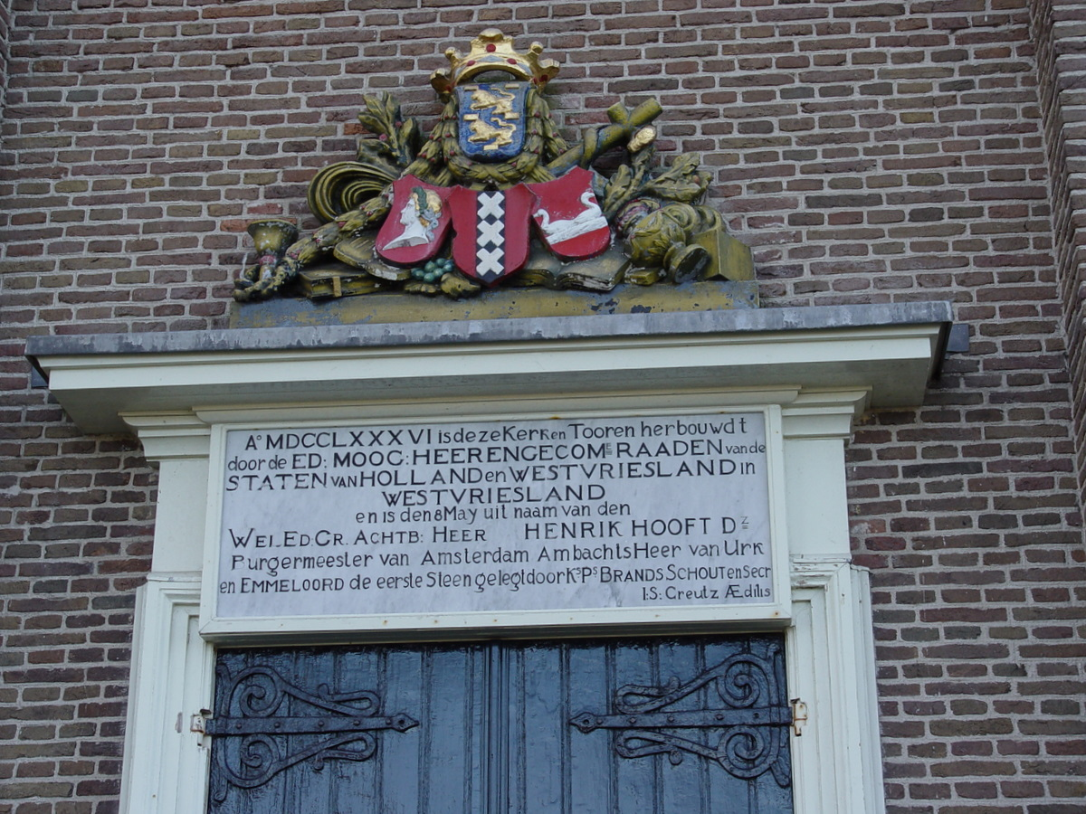 Kerkje aan zee in Urk bord aan de zijkant